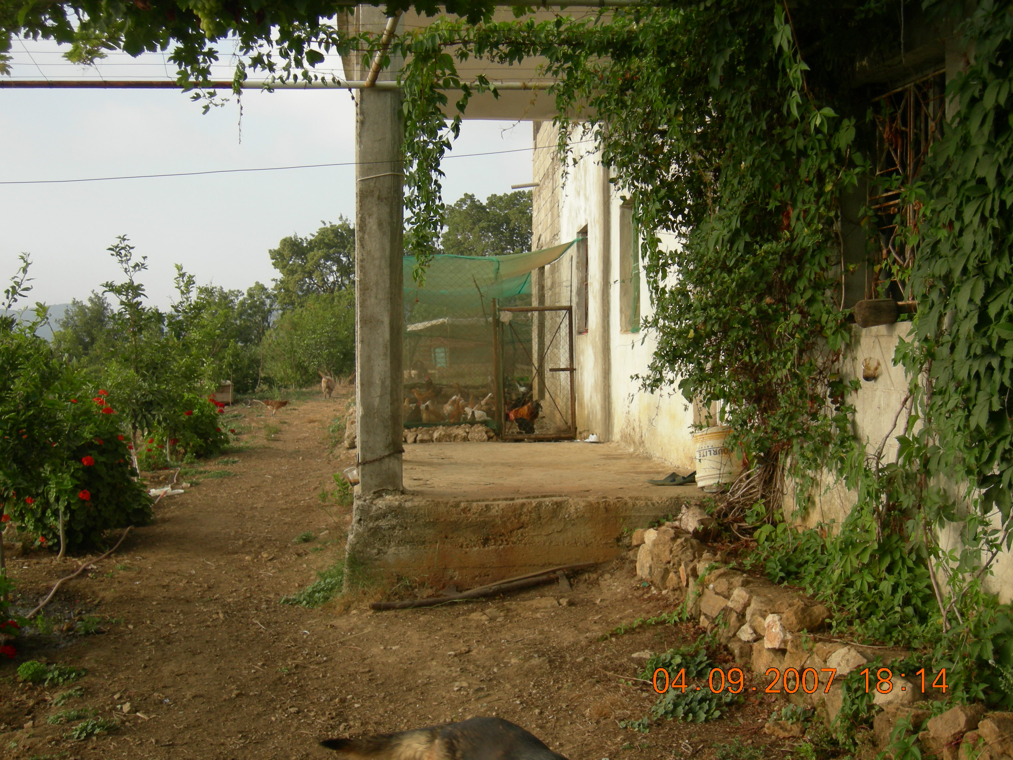 Famer House in Jbaa